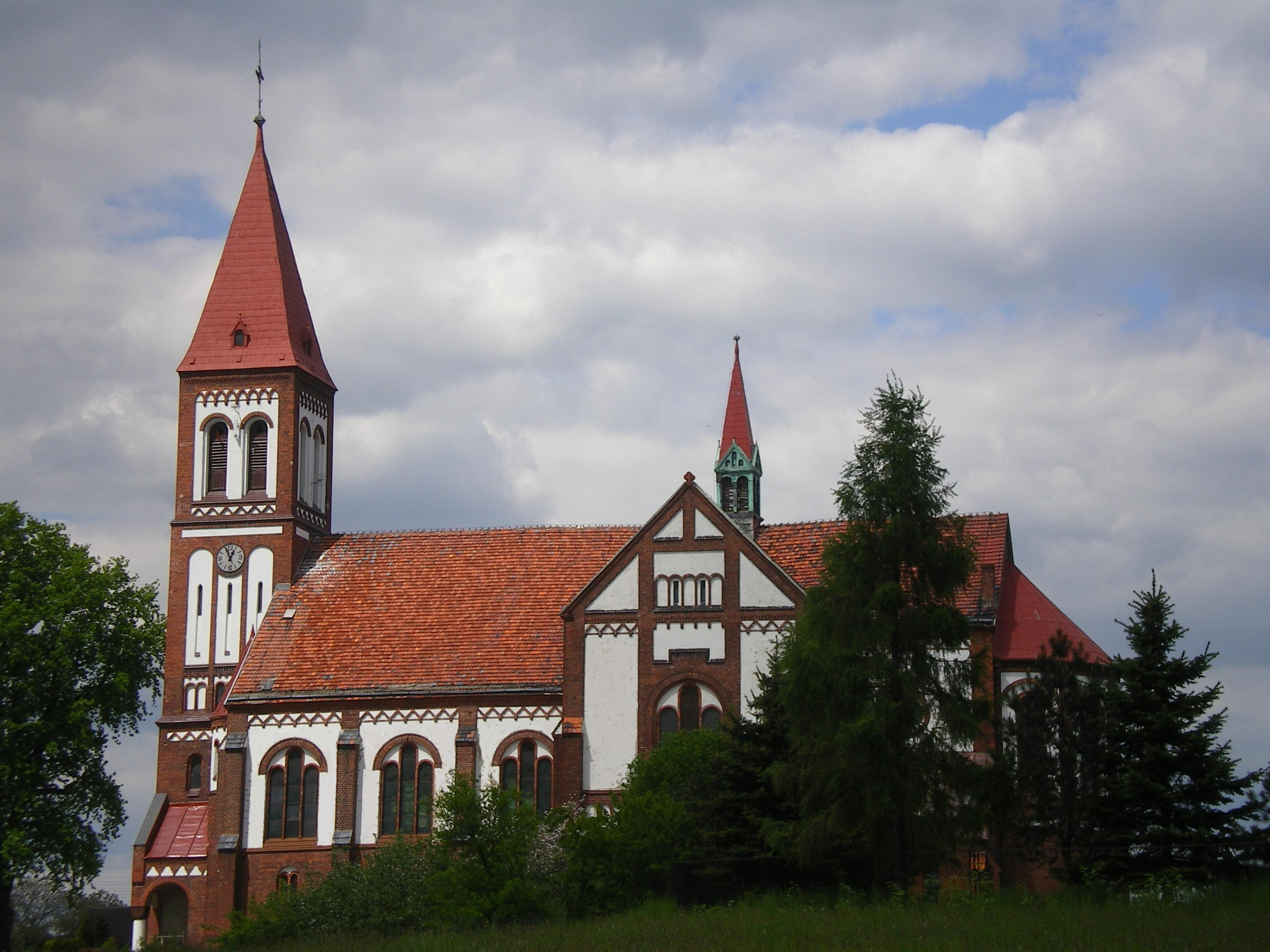 Pstrążna, kościół parafialny, woj. śląskie